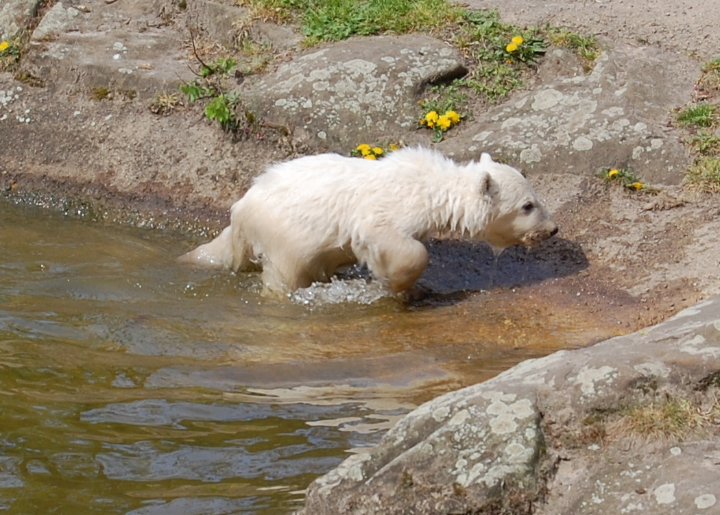 Eisbär Knut im Berliner Zoo